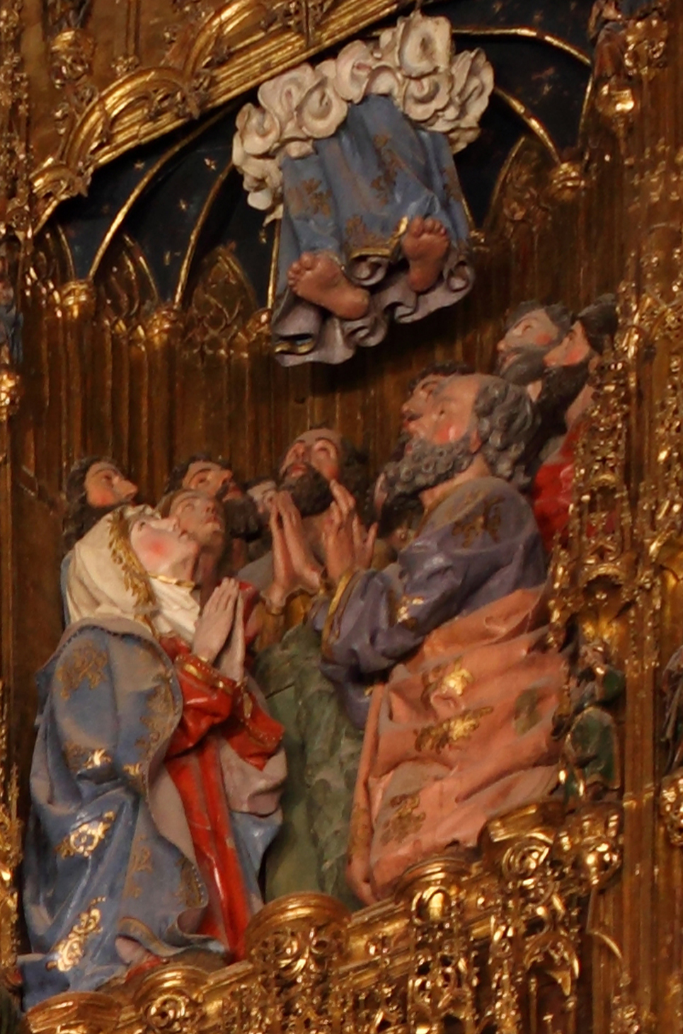 Detalle de la Ascensión en el retablo mayor de la Catedral de Toledo (España)